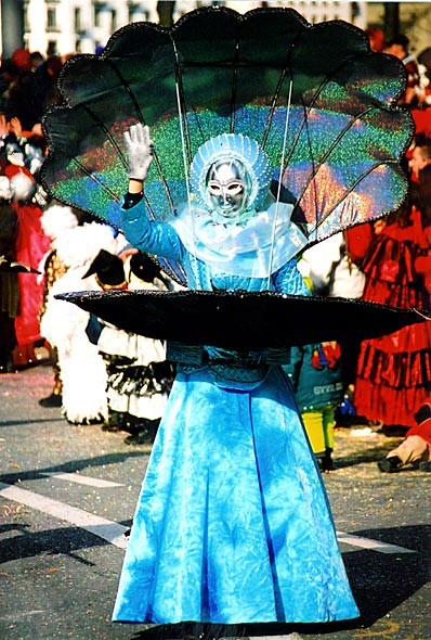 Fasnacht in Luzern: Güdismäntig-Umzug 2001